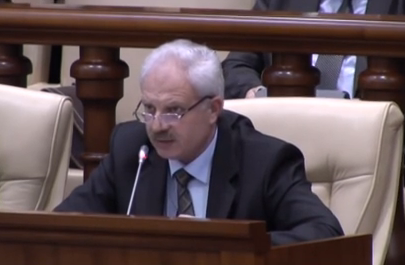 Vasile Șova